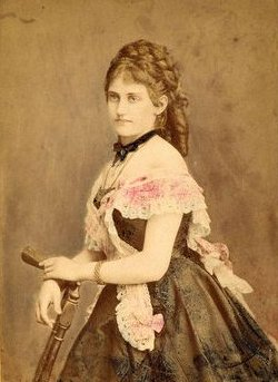 Helvey Laura (1852-1931) magyar drámai színésznő kb. 22 éves korában